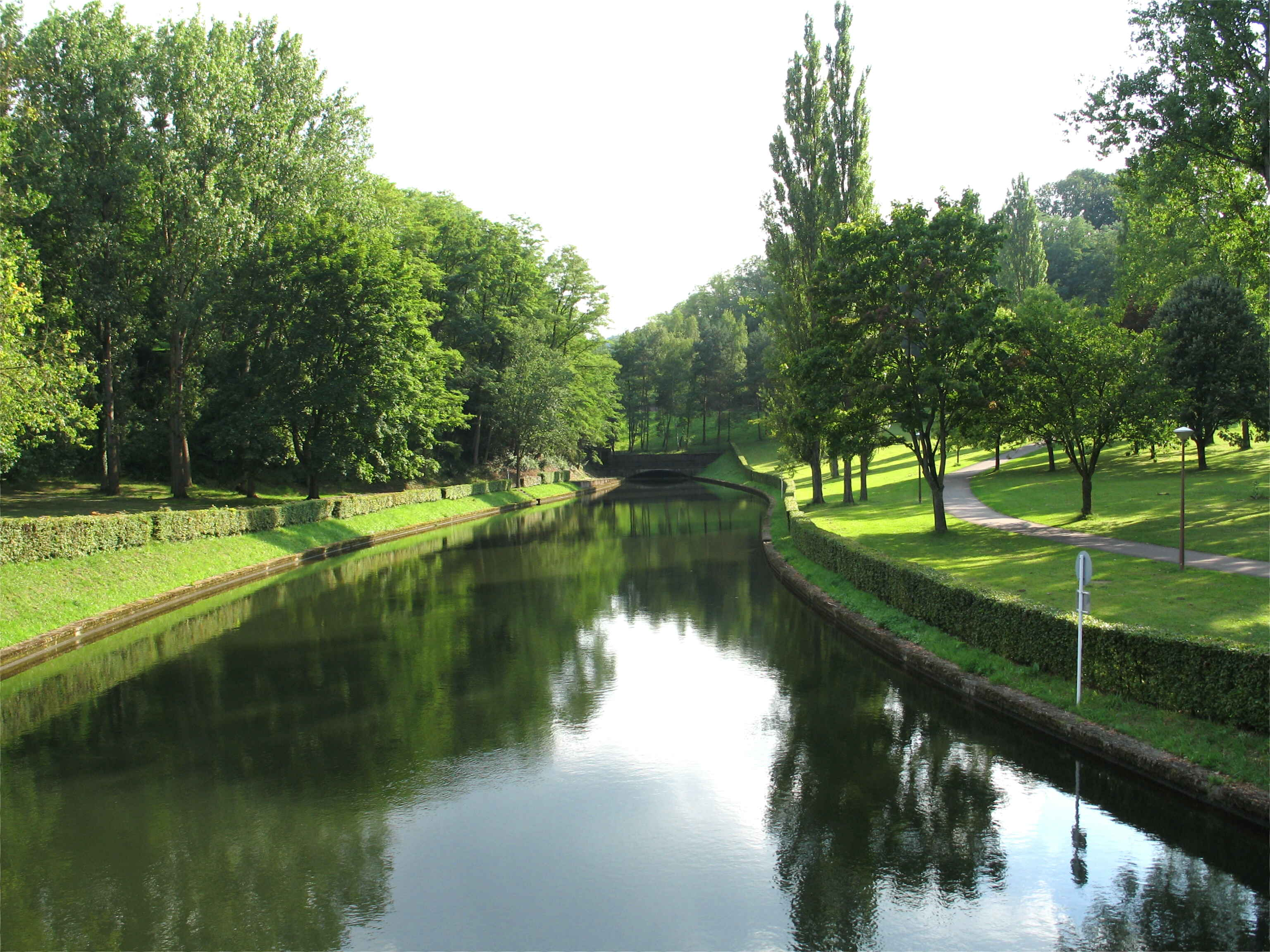 Beim Barrage vun der Sauer zu Rouspert.